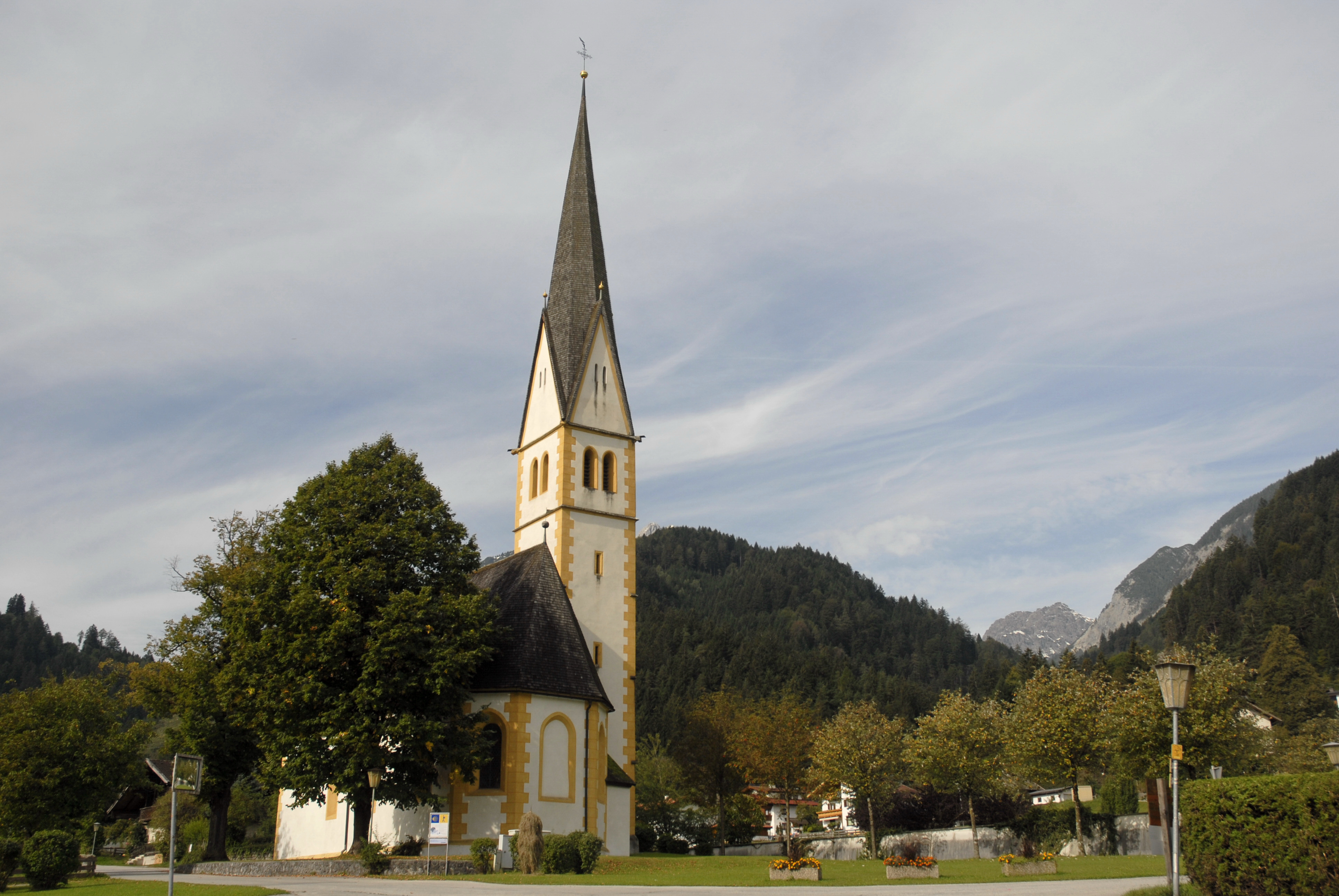 Stans, Kirche Sankt Laurentius und Ulrich